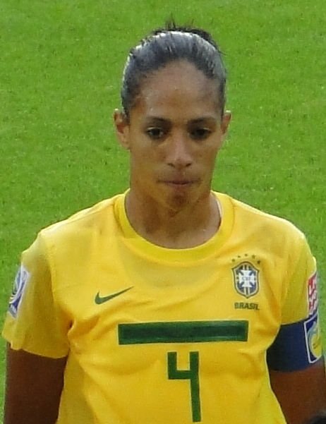 Time titular do jogo Brasil x Noruega, disputado em 03/07/2011, em Wolfsburg, Alemanha, na Volkswagen Arena, em partida válida pela Copa do Mundo Feminina de 2011, contra a Noruega.